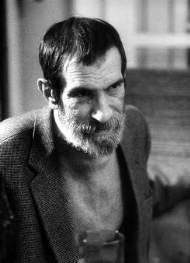 Petri György magyar költő, műfordító, újságíró.